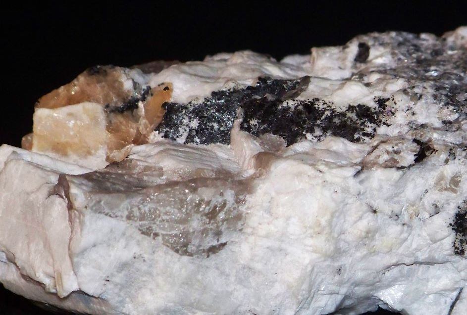 Klinochlor z pegmatytów w towarzystwie kalcytu, kwarcu oraz albitu, kamieniołom Zimnik, okolice Jeleniej Góry